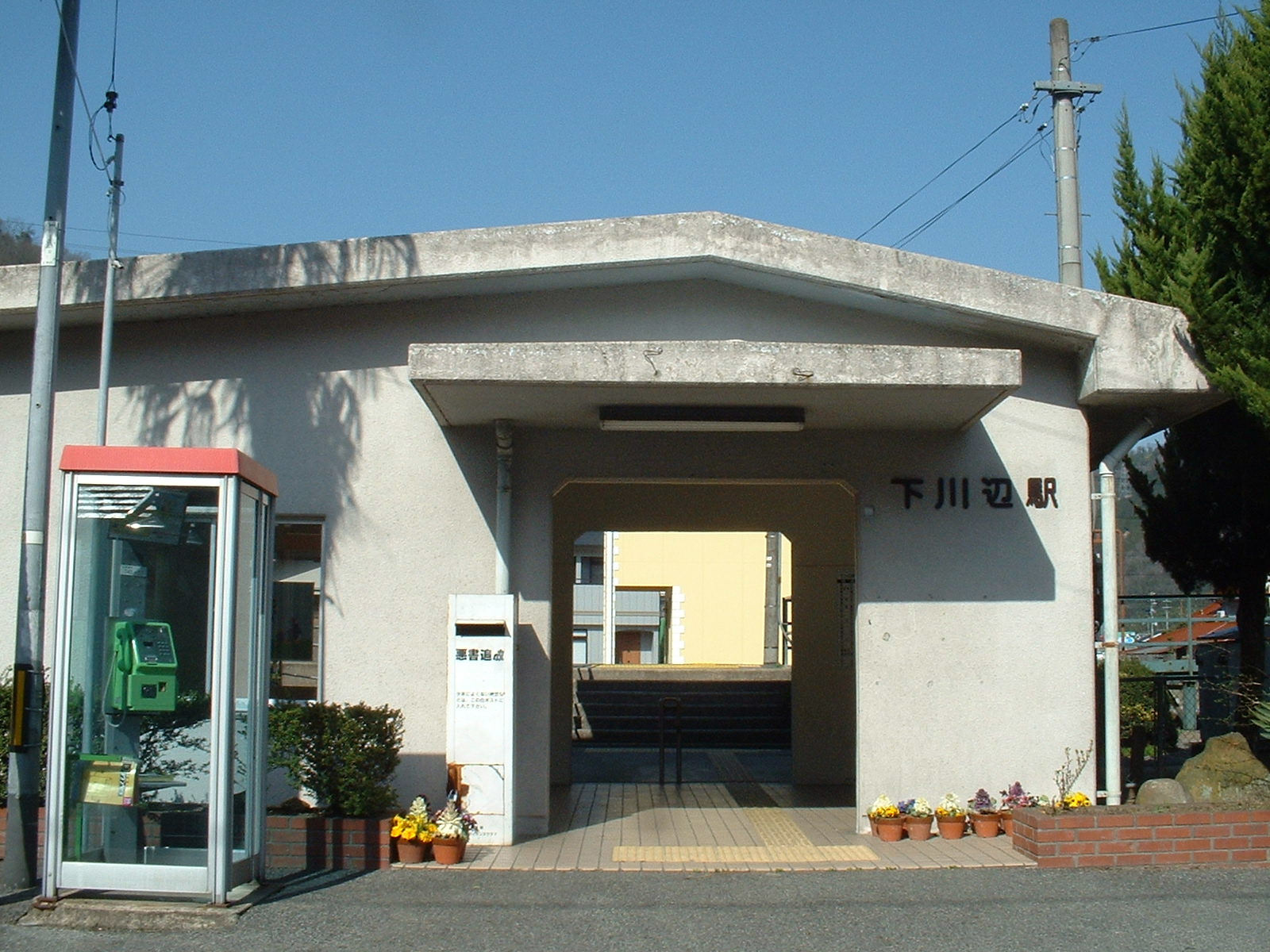 下川辺駅、2006年3月25日に投稿者が撮影